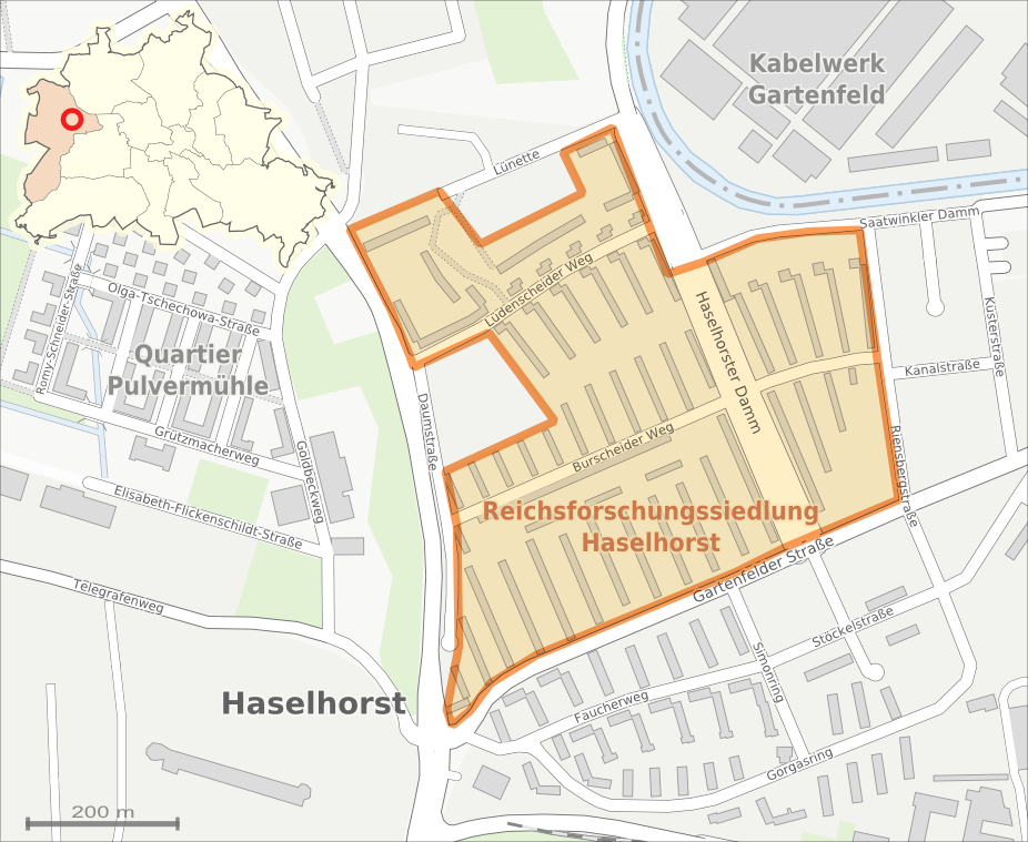 Karte der Reichsforschungssiedlung Haselhorst